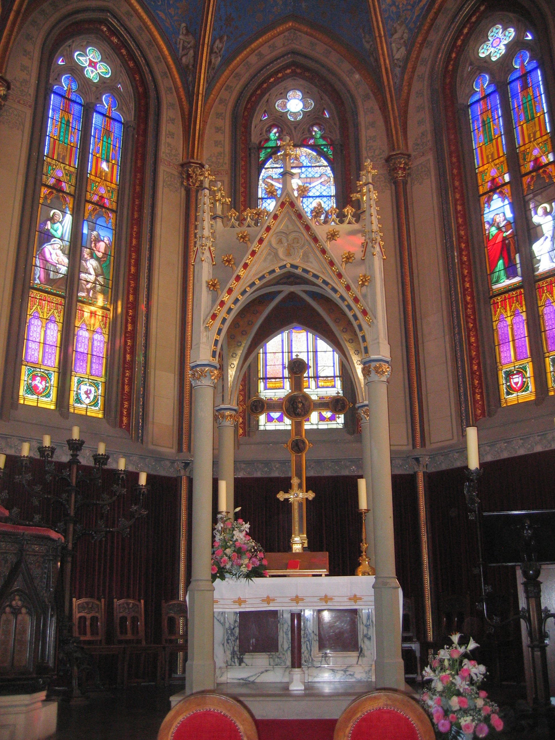 Hohenzollern Castle near Hechingen in Baden-Württemberg, Germany